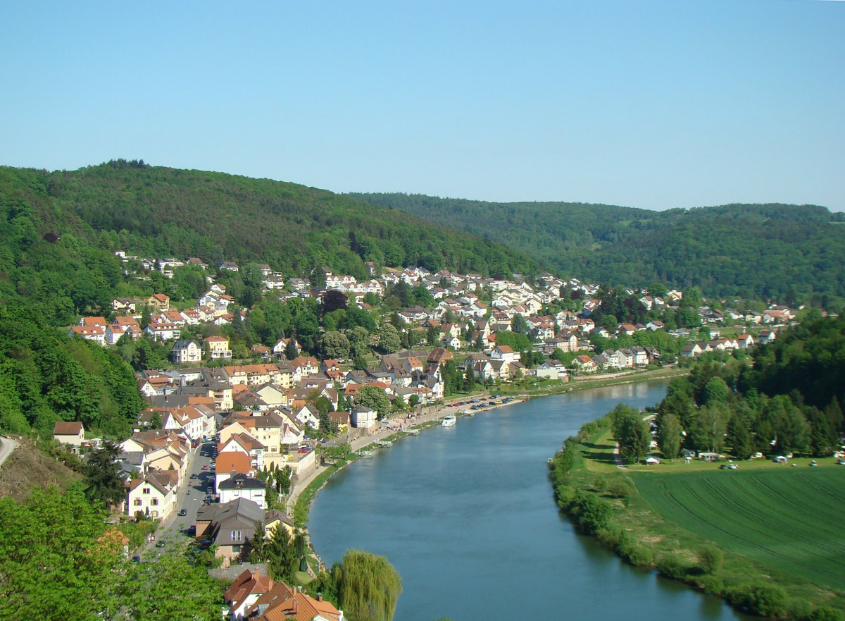 Blick von der Hinterburg auf Neckarsteinach